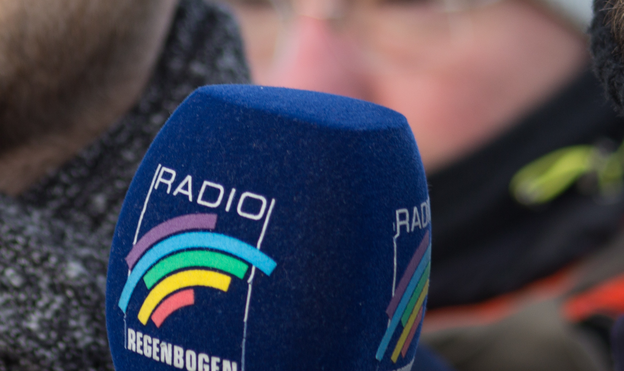 Ankunft der deutschen Olympiamannschaft am 26. Februar 2018 mit Flug LH713 auf dem Frankfurter Flughafen.